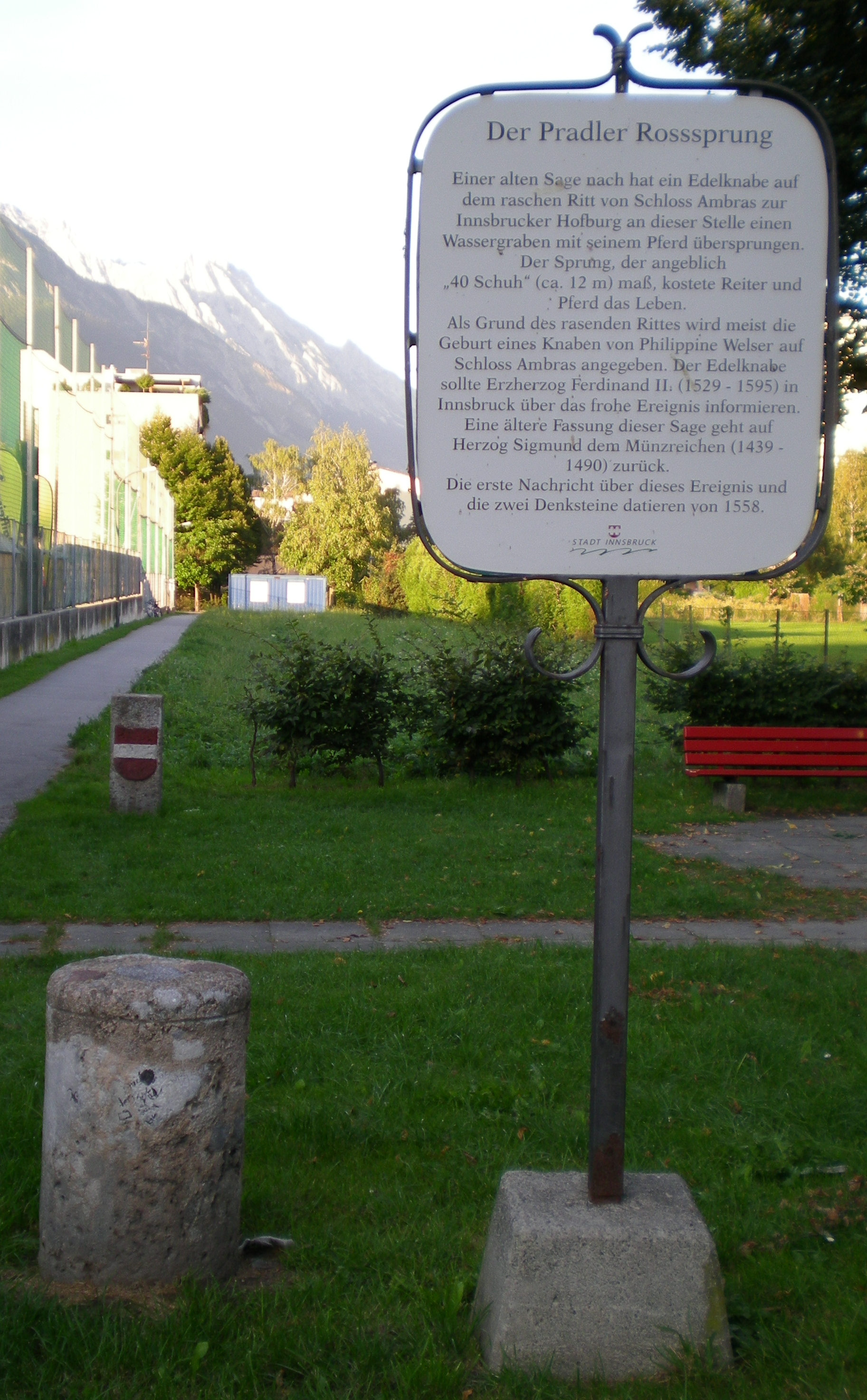 Ereignisdenkmal, Zwei Wappensteine ""Roßsprung""